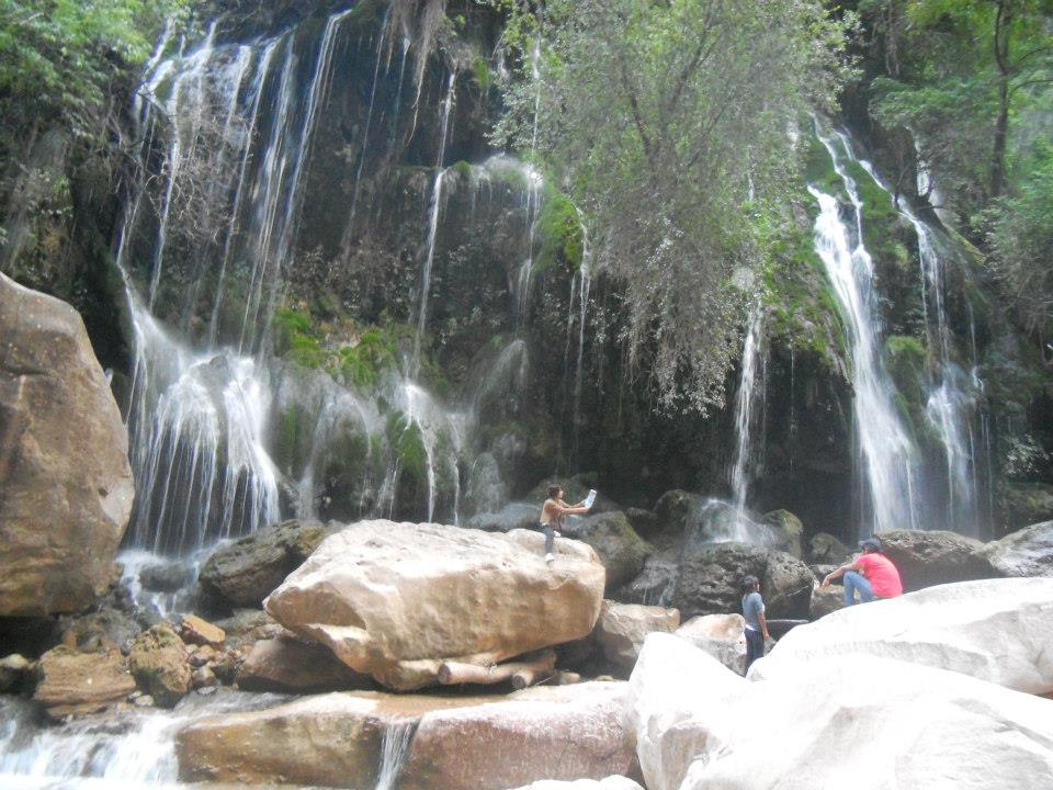 vergel torotoro This medium shows the protected monument with the number C/00-210 in Bolivia.